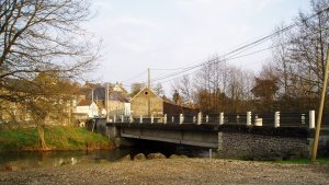 Pont des Planches